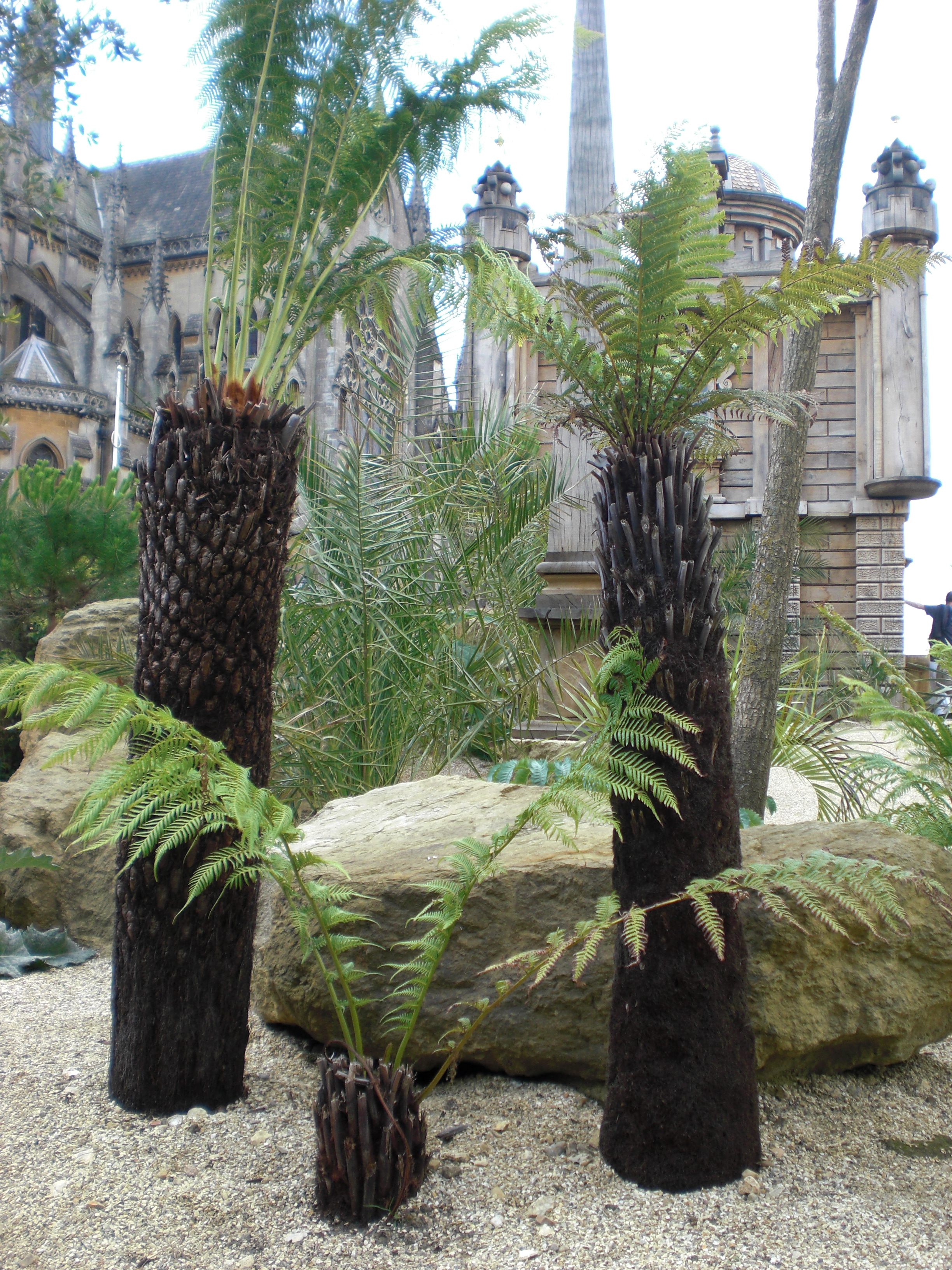 Baumfarn im Park des Arundel Castle